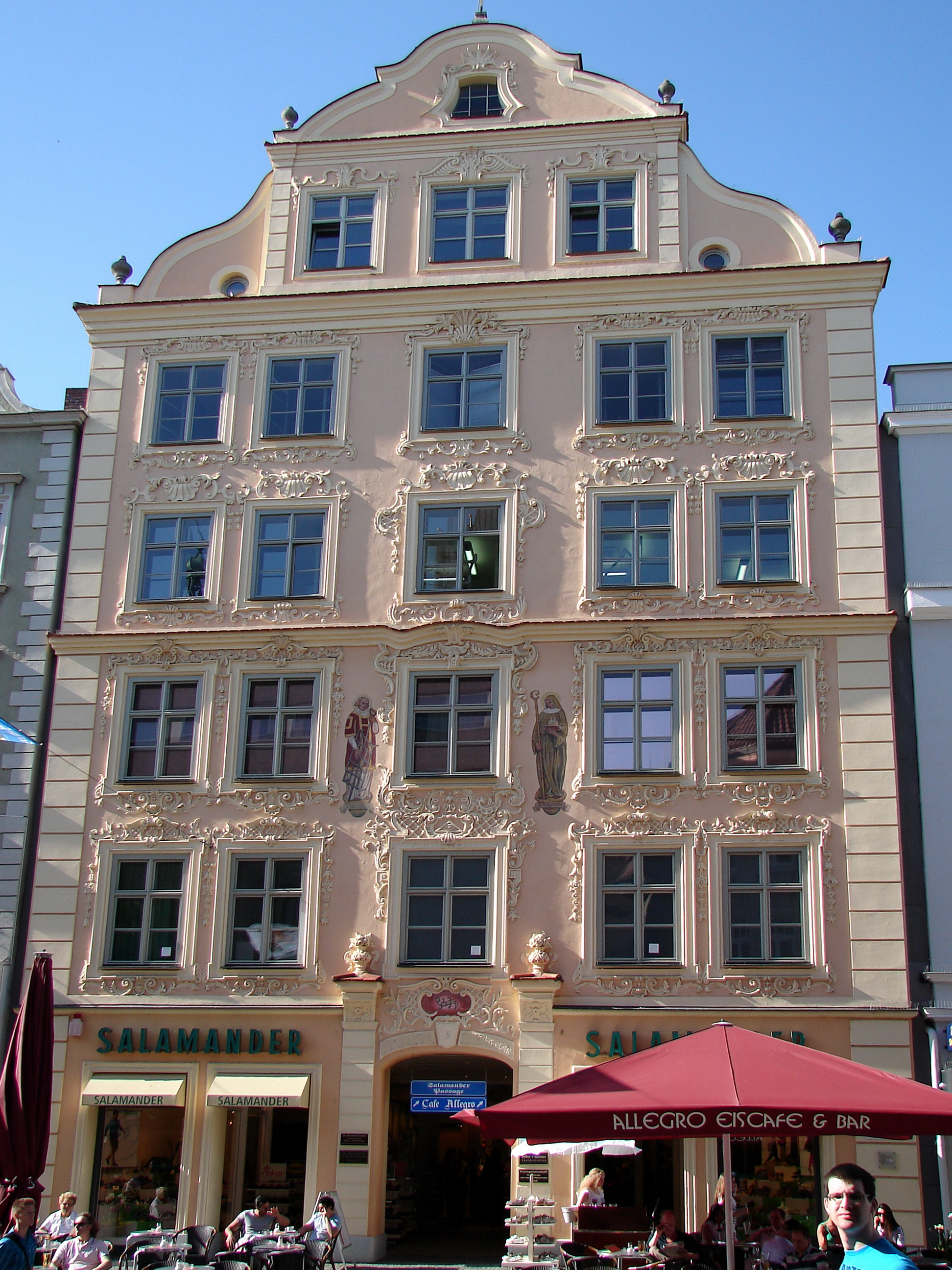 Fassade des Wohn- und Geschäftshauses, fünfgeschossig mit geschweiftem Knickgiebel und reicher Stuckierung mit Rocaillen und vegetabilen Formen, 1746, nach Entkernung wiedereingebautes barockes Treppenhaus sowie hofseitige Front und teilweise tonnengewölbte Kellerräume des mittelalterlichen Vorgängerbaus.